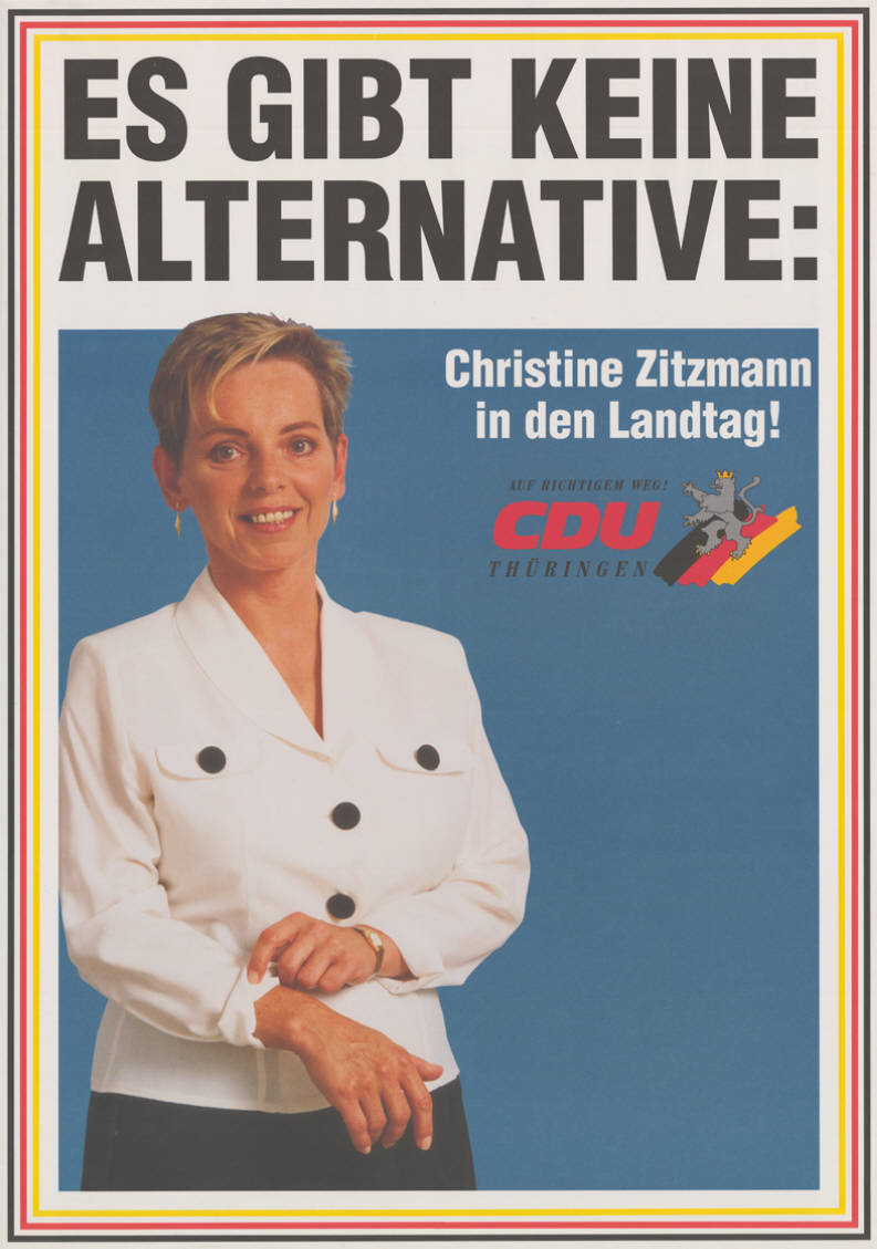 Es gibt keine Alternative: Christine Zitzmann in den Landtag! Auf richtigem Weg! CDU ThüringenAbbildung:Foto - Thüringer Löwe - NationalfarbenPlakatart:Kandidaten-/Personenplakat mit PorträtAuftraggeber:CDU LV ThüringenObjekt-Signatur:10-037 : 111Bestand:Landtagswahlplakate Thüringen (10-037)GliederungBestand10-18:Landtagswahlplakate Thüringen (10-037) » CDULizenz:KAS/ACDP 10-037 : 111 CC-BY-SA 3.0 DE